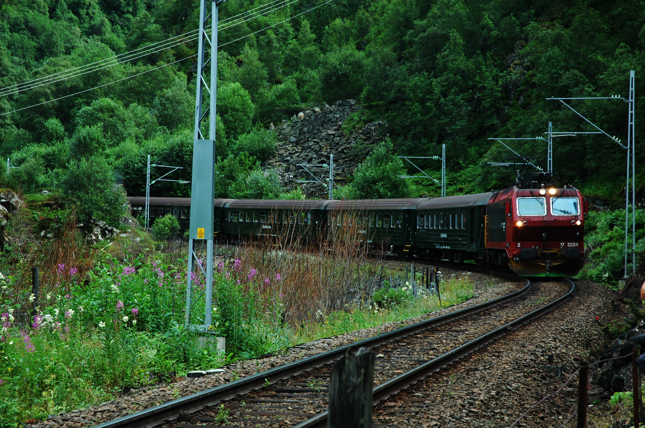 De Flåmsbana in Flåm, Noorwegen; (en) The Flåmsbana in Flåm, Norway